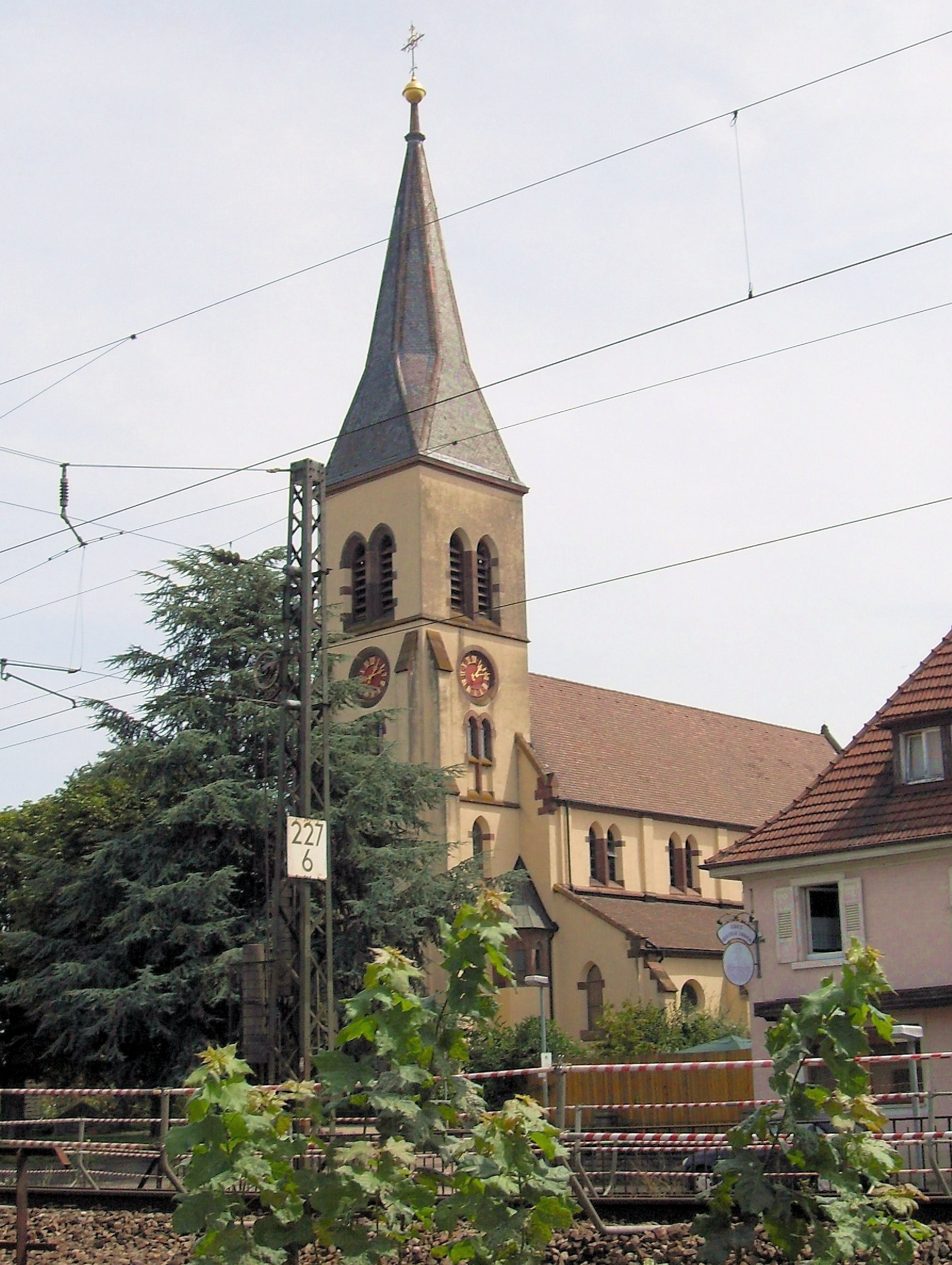 Kirche St. Agnes in Eschbach